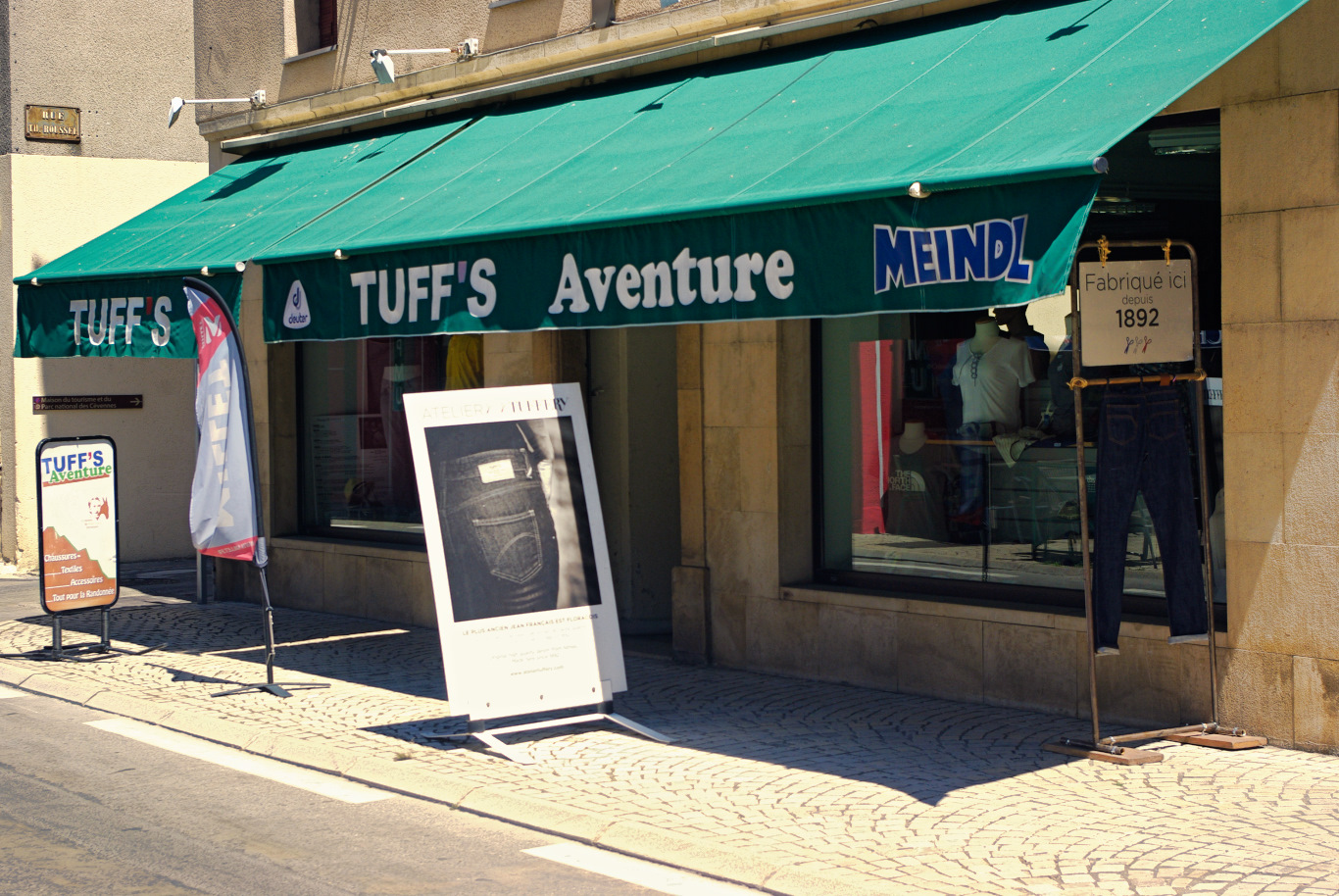 boutique Tuffery où se vendent à Florac les productions de l'atelier fondateur de la toile Denim